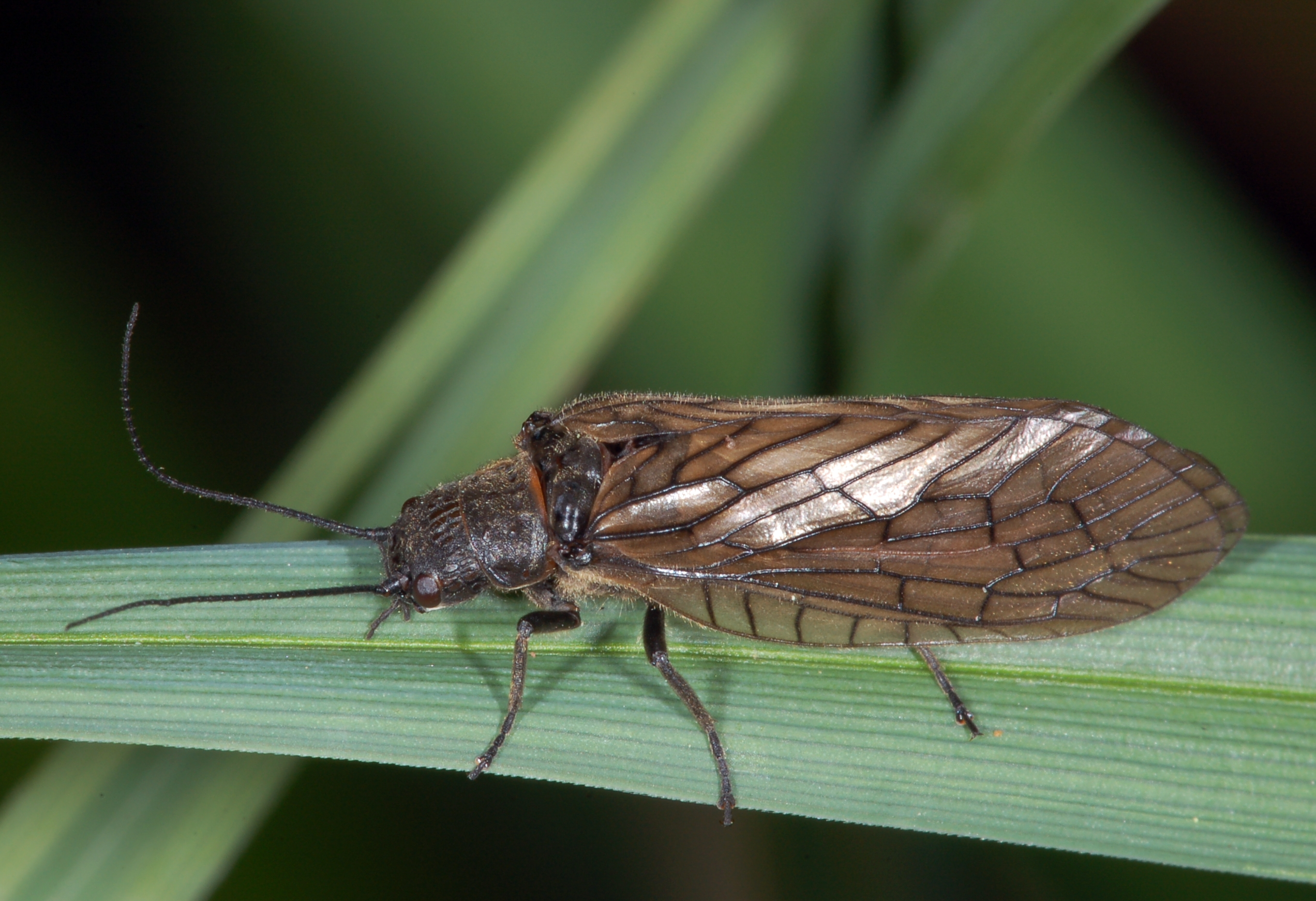 Schlammfliege (Sialidae), Selzerbrunnen, Nied, FRankfurt am Main, Deutschland